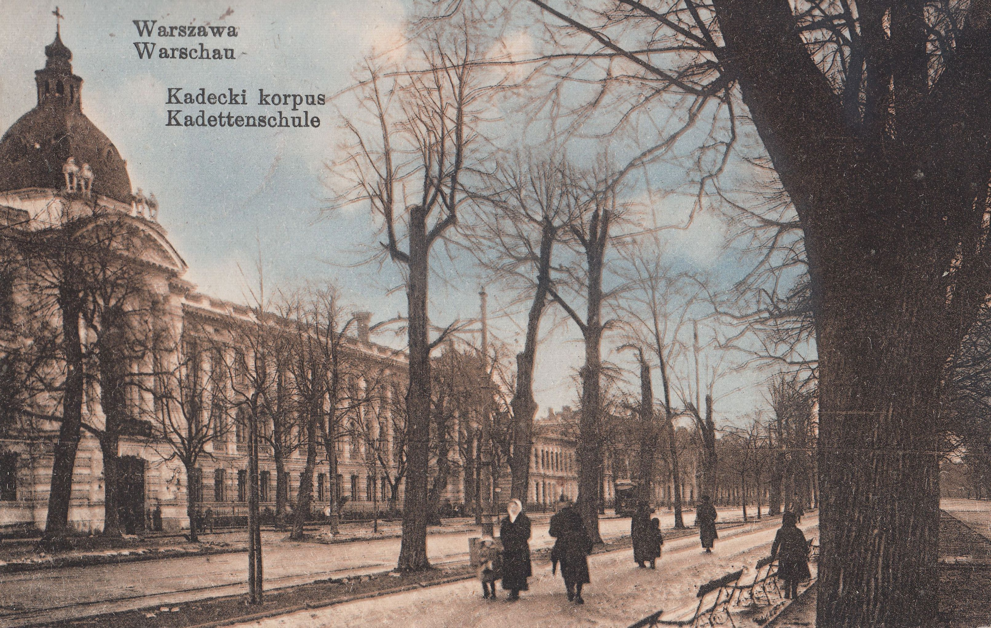 Aleje Ujazdowskie, po lewej gmach główny Korpusu Kadetów im. Aleksandra Suworowa